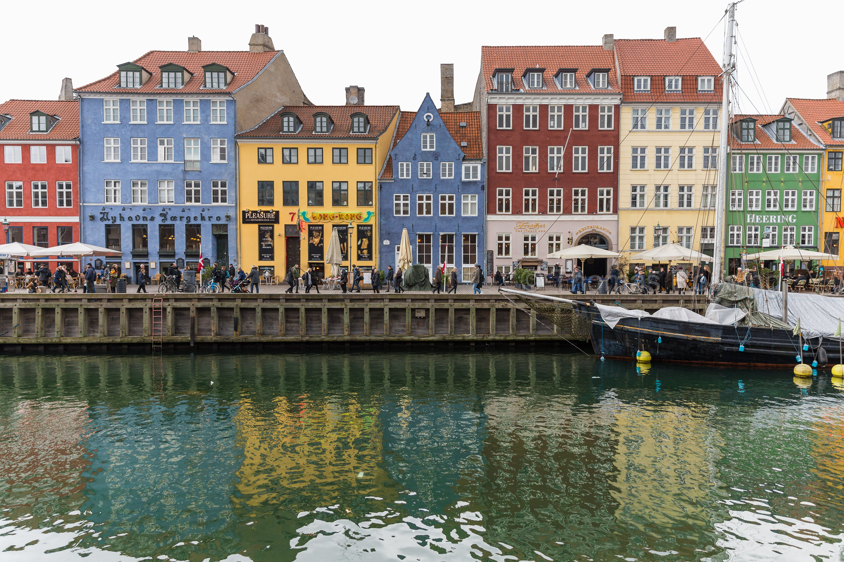 Nyhavn in Copenhagen, Denmark